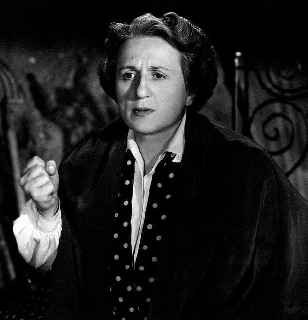 Portrait of Italian actress Titina De Filippo (Annunziata De Filippo) in the film Cani e gatti. Italy, 1952.